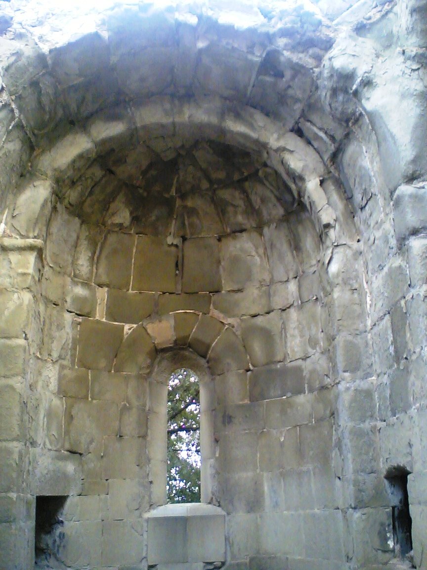 ჯვრის მონასტრის მცირე ტაძრის საკურთხეველი